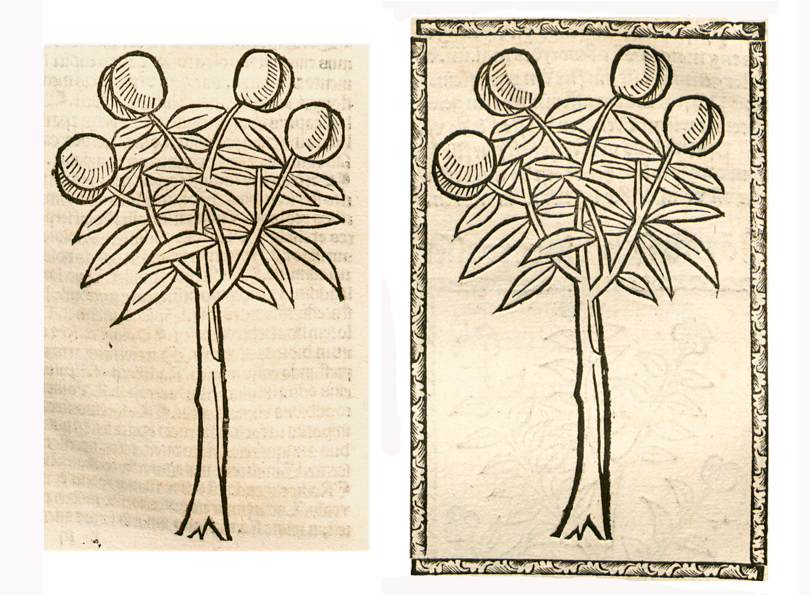 Abbildung von: Pfirsich Loub (Prunus persica)